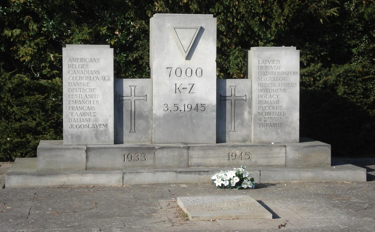 Ehrenfriedhof Cap Arkona